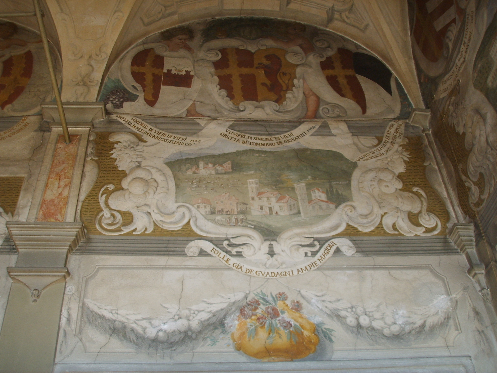 Palazzo_di_San_Clemente,_ frescoes in the loggetta in Florence